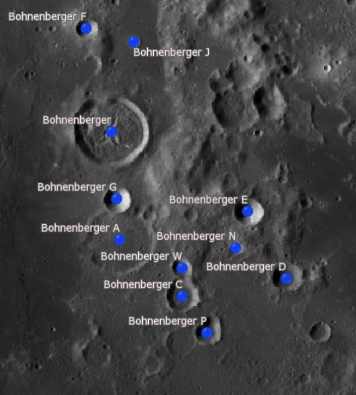 Cráter lunar Bohnenberger. Cráteres satélite. (Imagen LRO)